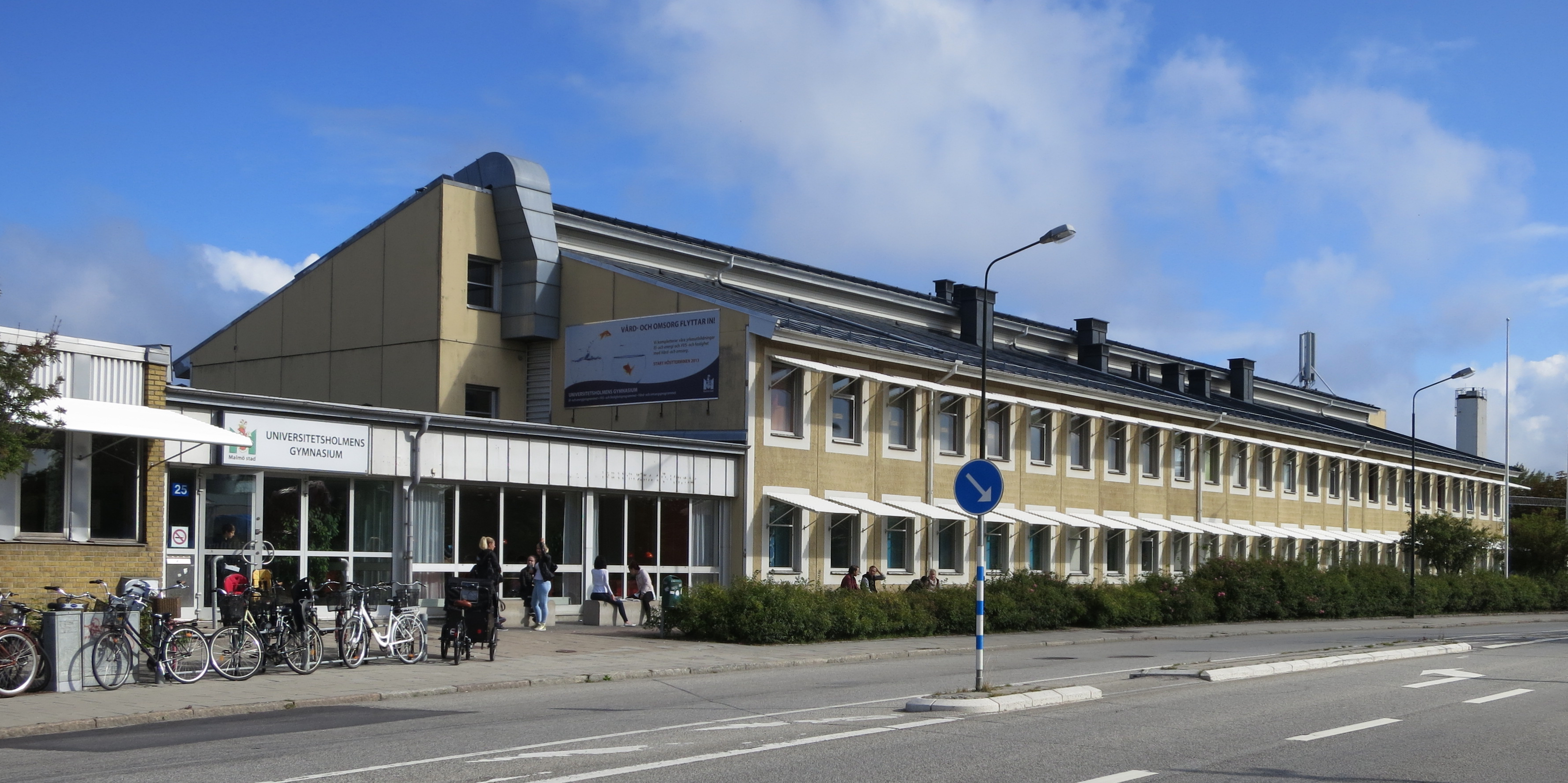 Universitetsholmens gymnasium